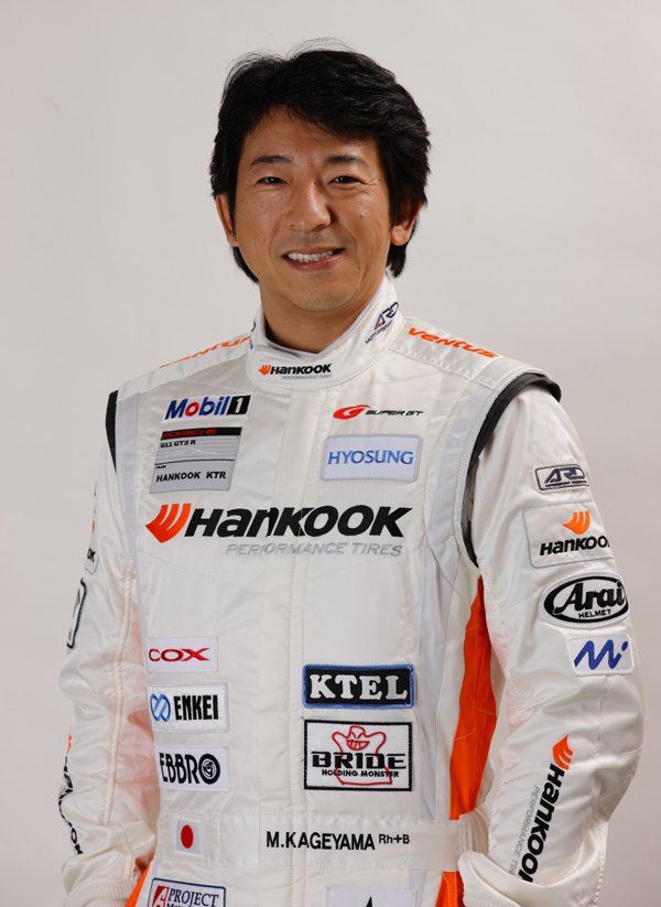 SUPER GT 2011 Fuji Speedway